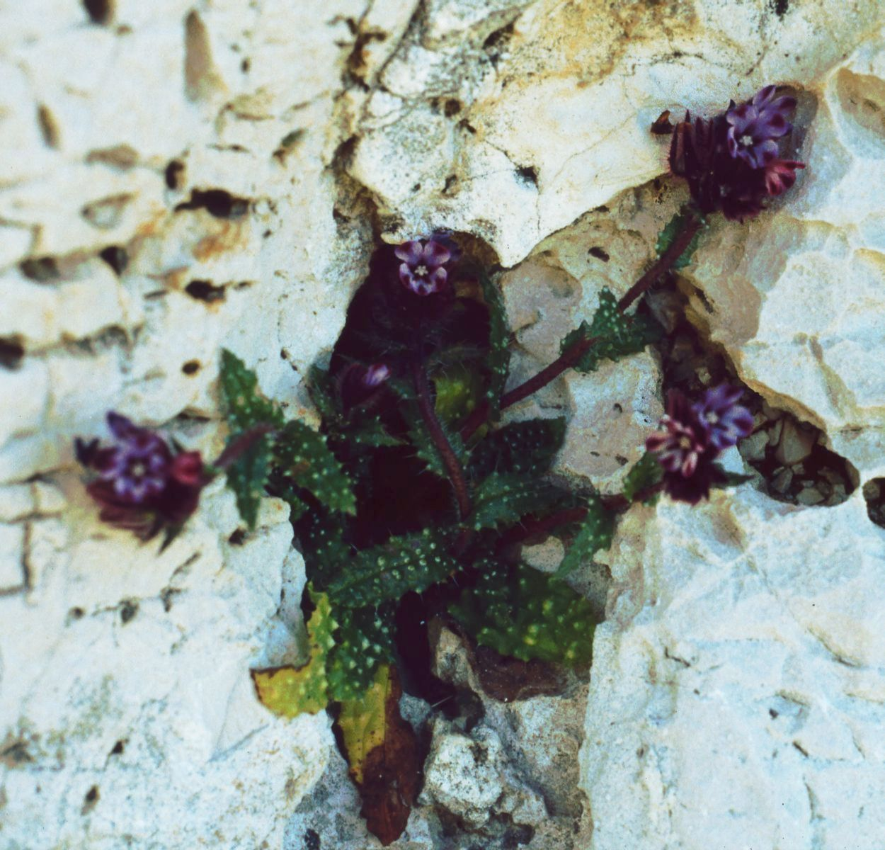 Anchusella variegata, Raublattgewächse (Boraginaceae) – Griechenland/Ελλάδα/Greece: Erisos/Έρισος, südlich ober der Myrtos-Bucht, NW Divaráta/Διβαράτα (Kefallinia/Κεφαλληνία)